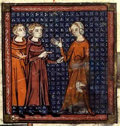 Santa Taisia (Taide) Penitente.